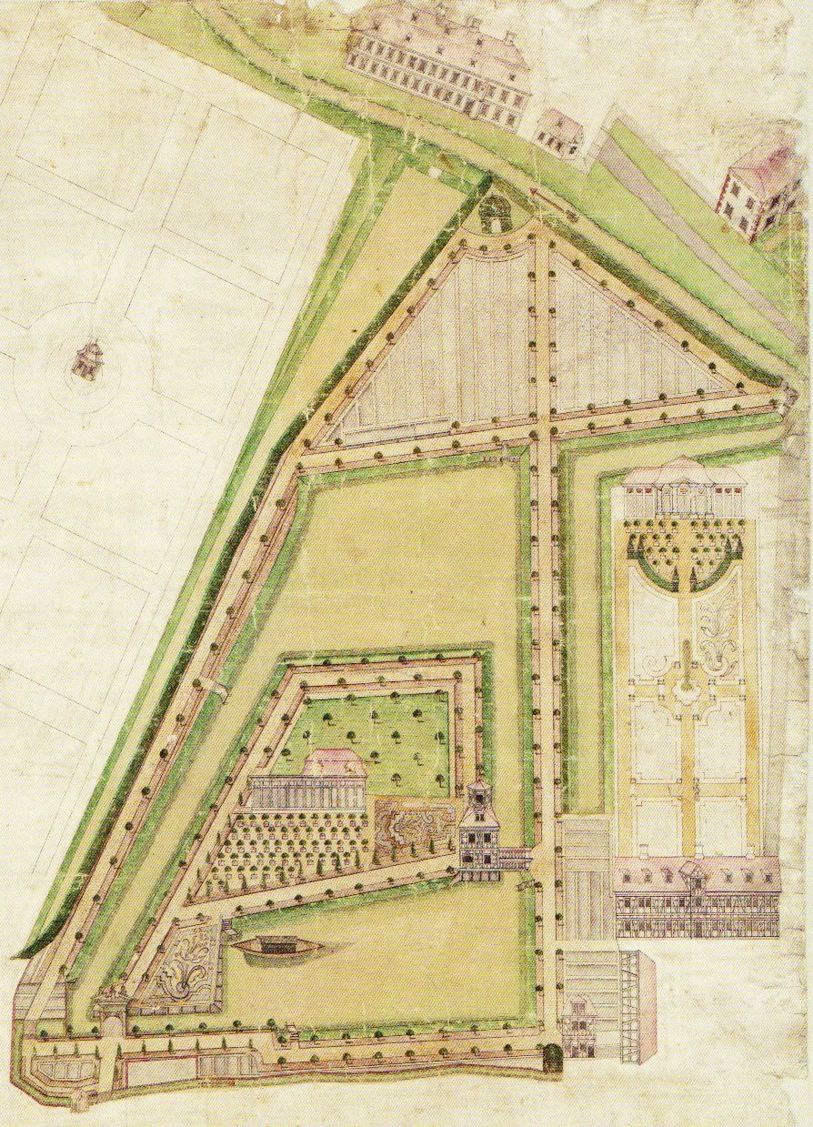 Plan des Weidmannschen Gartens in Leipzig